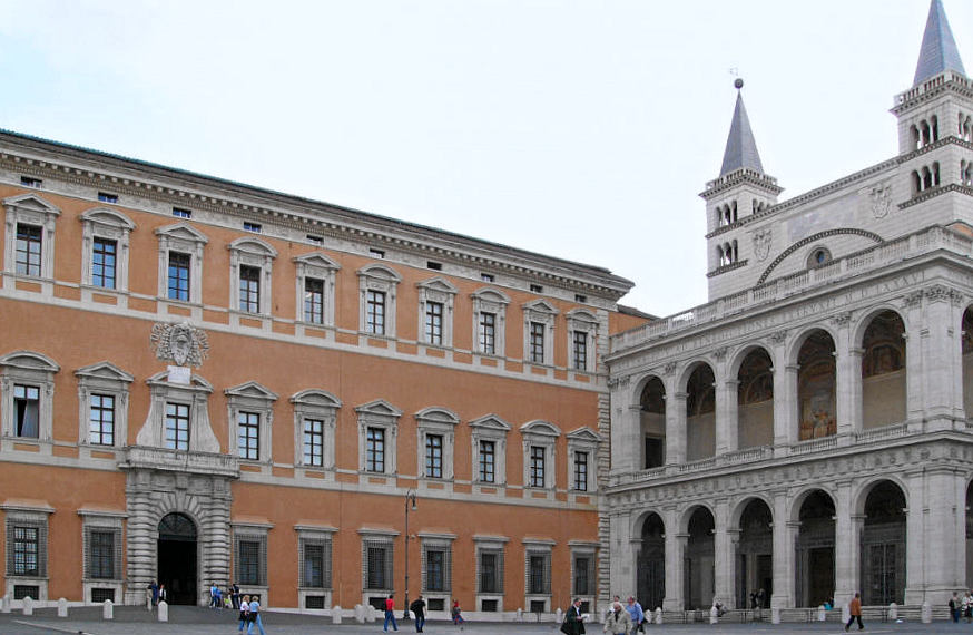 Das Bild zeigt den Lateranspalast und das Seitenportal der Lateransbasilika von der Piazza S. Giovanni in Laterano aus.